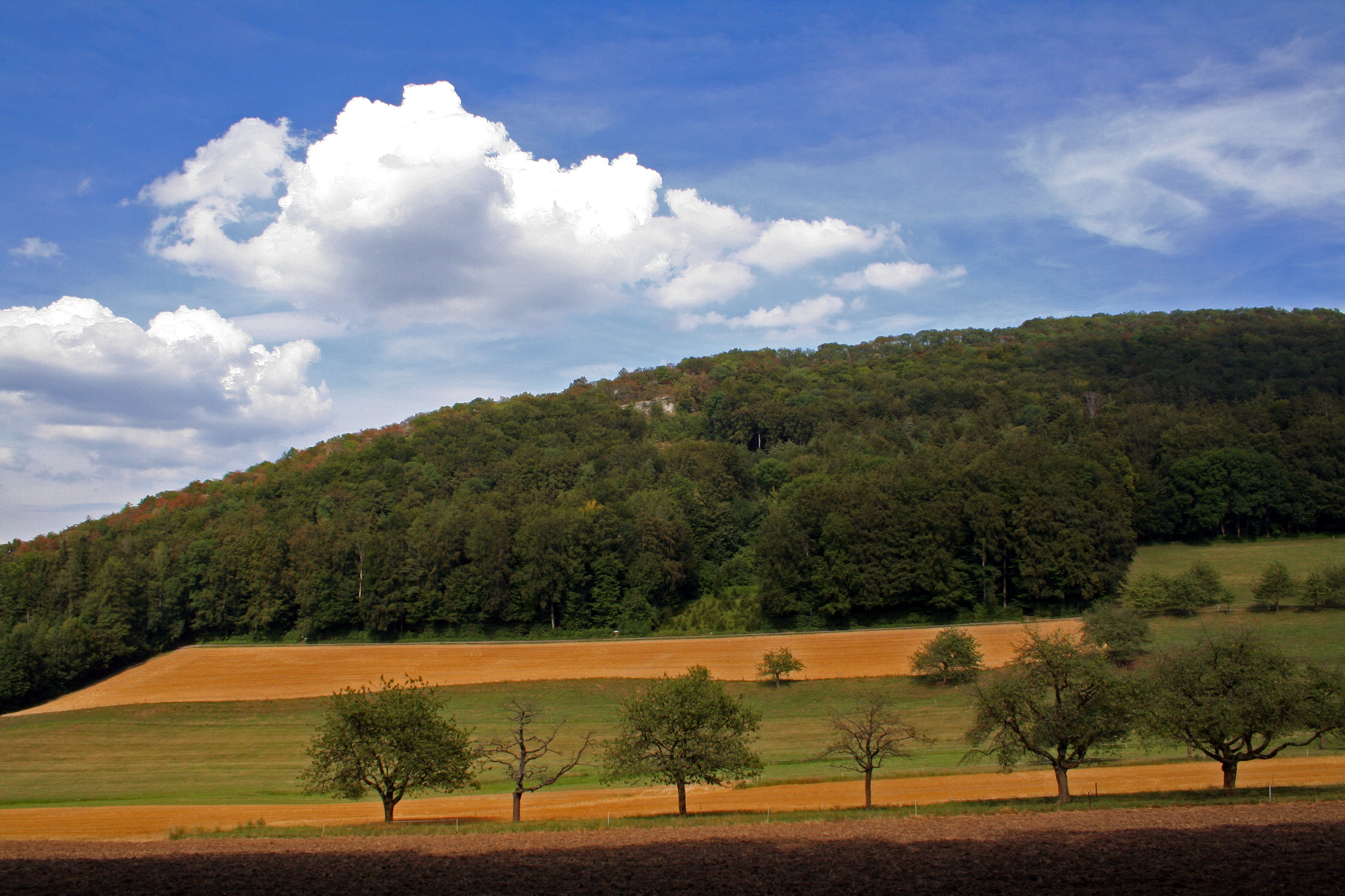 Mountain Engelberg in Starrkirch-Wil/Olten